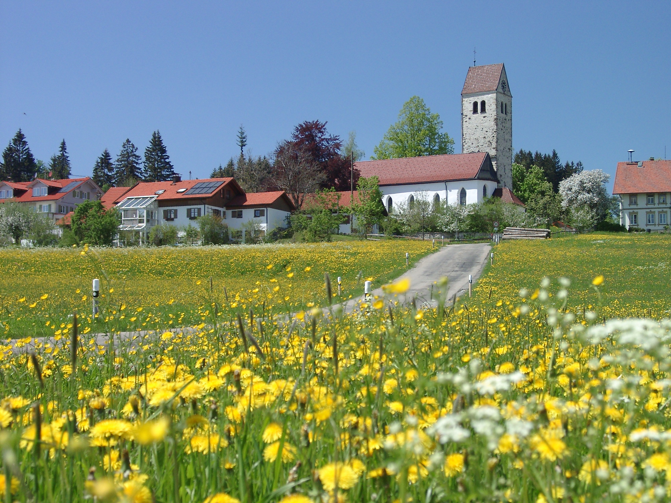 Rechtis im Allgäu mit Kirche St. Ulrich zur Löwenzahnblüte im Frühjahr (Der Name St. Georg und Florian ist falsch. Siehe [1] [2] [3] [4] [5] auf Grund eines Hinweises im OTRS. Entstehung: um 1700 Baustil: Gotik/Frühbarock Freskant: Linus Seif (1774) Besonderheiten: gotische Holzfiguren der Heiligen Laurentius, Paulus, Helena, Ulrich. Gotische „Heilige Anna Selbdritt“ und Taufstein.